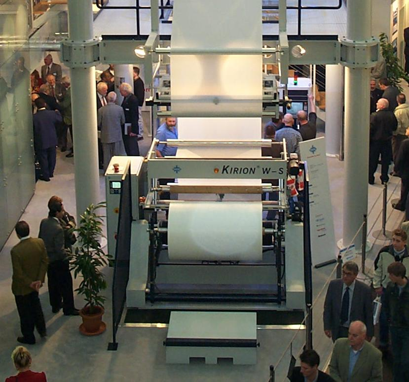 Wickler einer Blasfolienanlage der Firma Kiefel auf der Kunststoffmesse K'01 in Düsseldorf